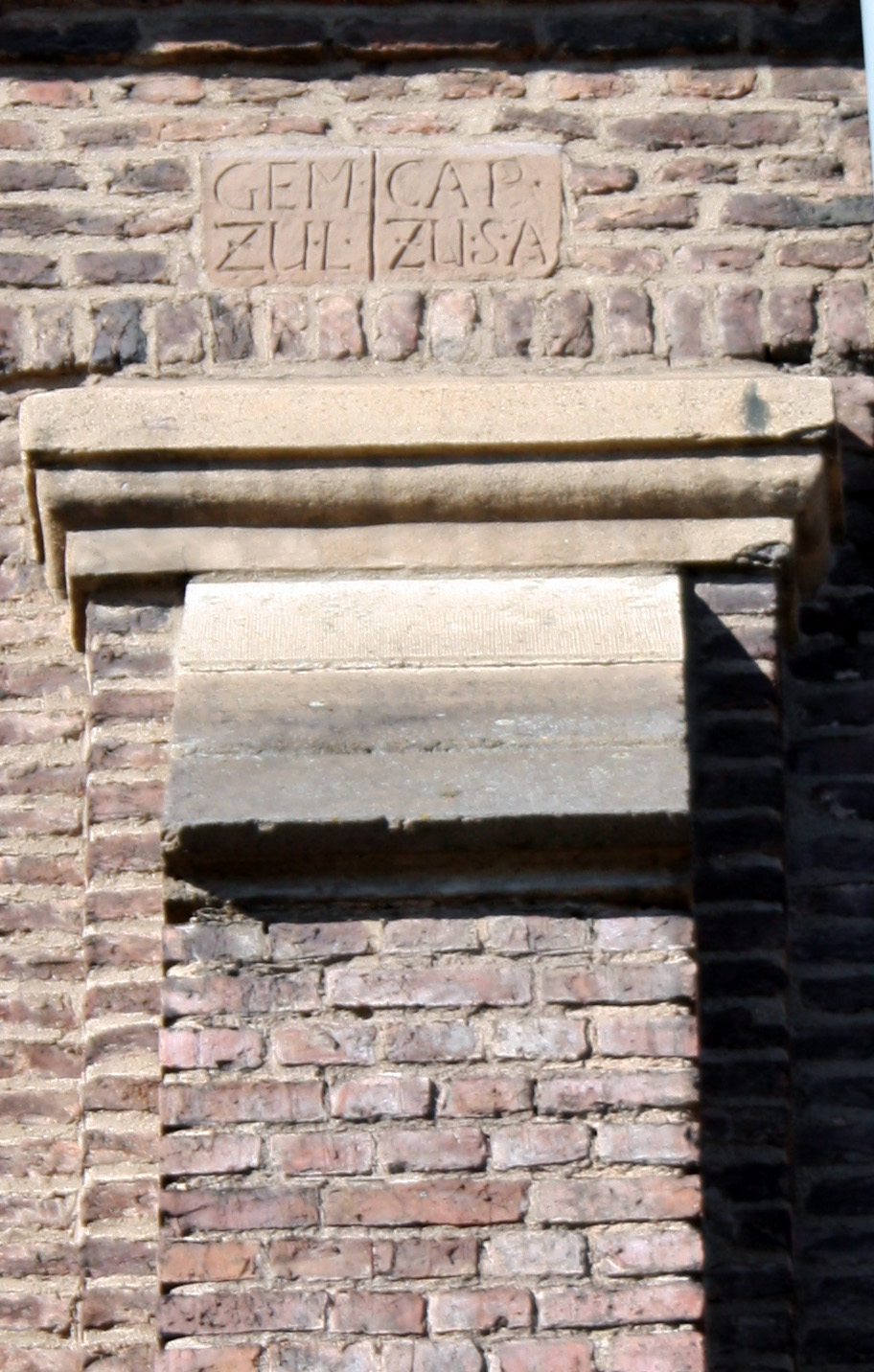 St. Kilian Lechenich, Steininschrift zur Baukostenaufteilung zwischen der Gemeinde Lechenich und dem Stift St. Aposteln. (ca. 1746/49)